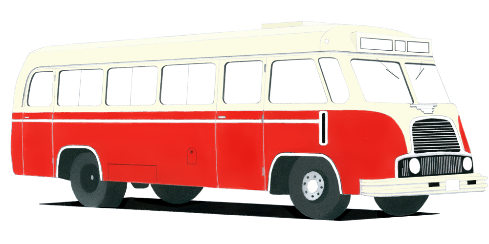 Rysunek autobusu Star N52 w kremowo-czerwonych barwach.